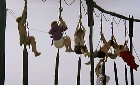 Screenshot from L’armata Brancaleone directed by Mario Monicelli